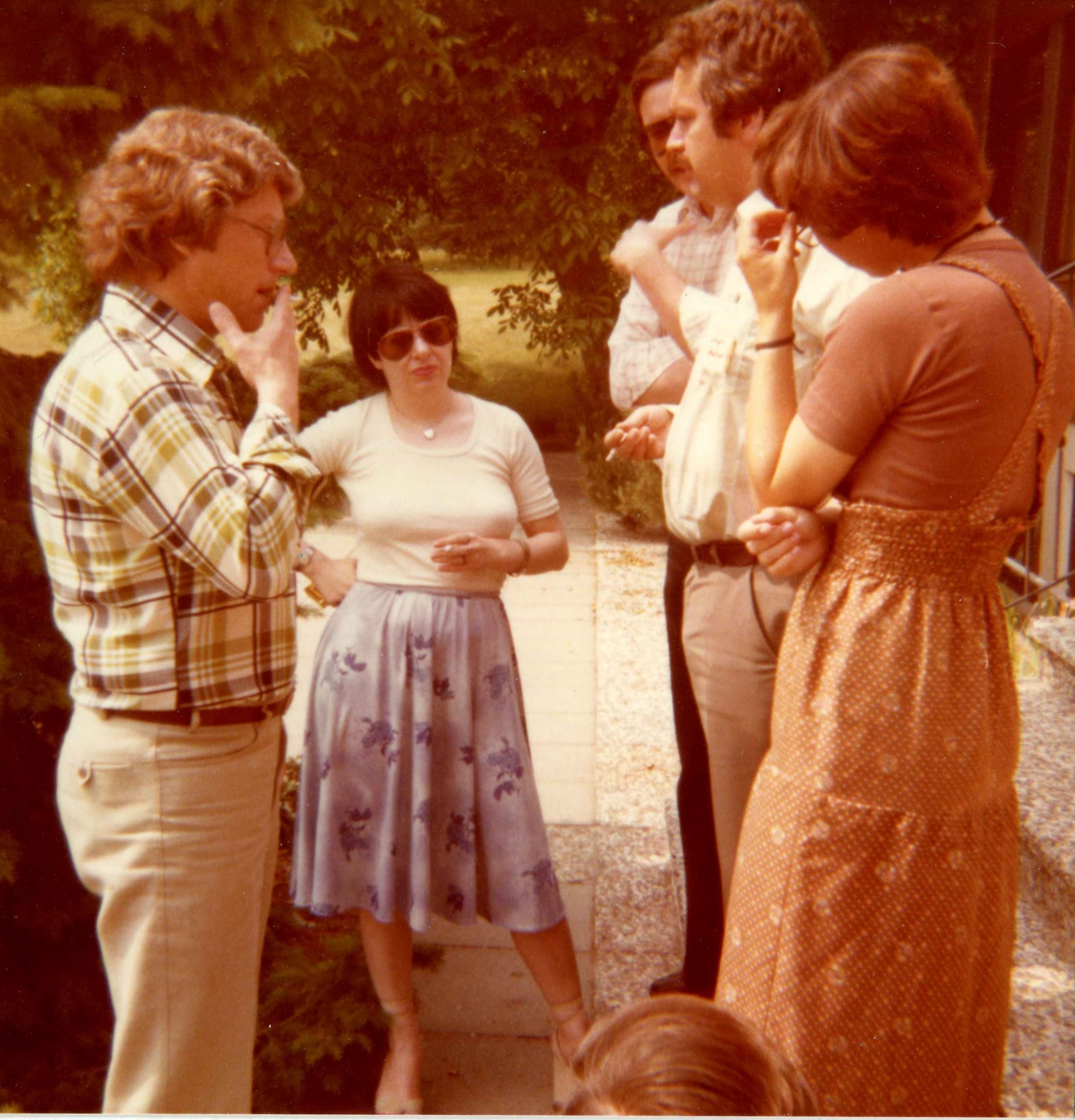 Karin Junker auf einem Seminar in Malente 1977. Später war sie Europaabgeordnete und Bundesvorsitzende der Arbeitsgemeinschaft sozialdemokratischer Frauen.